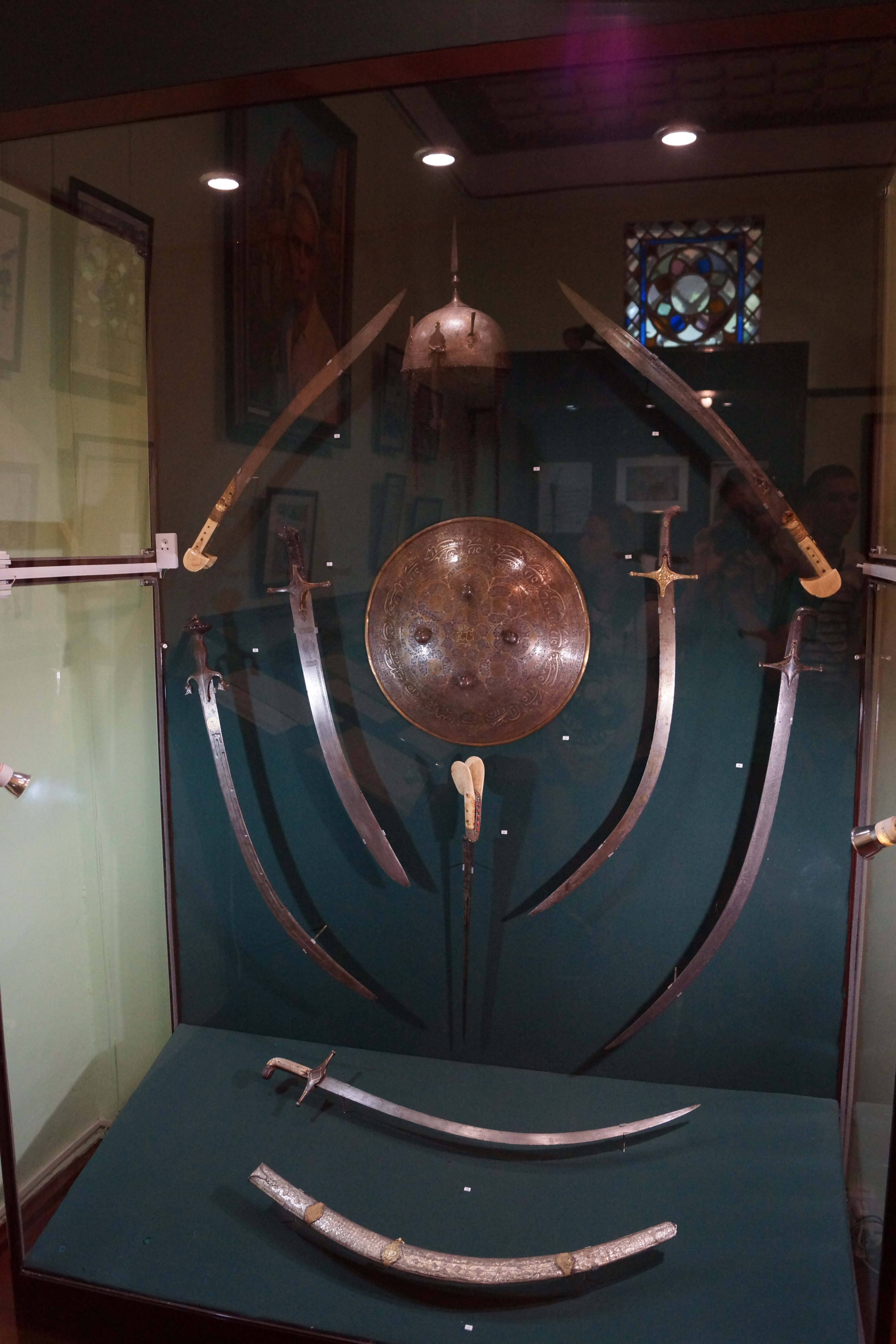 Бахчисарайский дворцово-парковый комплекс: улица Речная, 133, Бахчисарай, Бахчисарайский район, Крым This object is located on the Crimean Peninsula and recognized as cultural heritage by Russia under the monument ID: 8230070000. The legal status of the Crimean region is currently disputed.